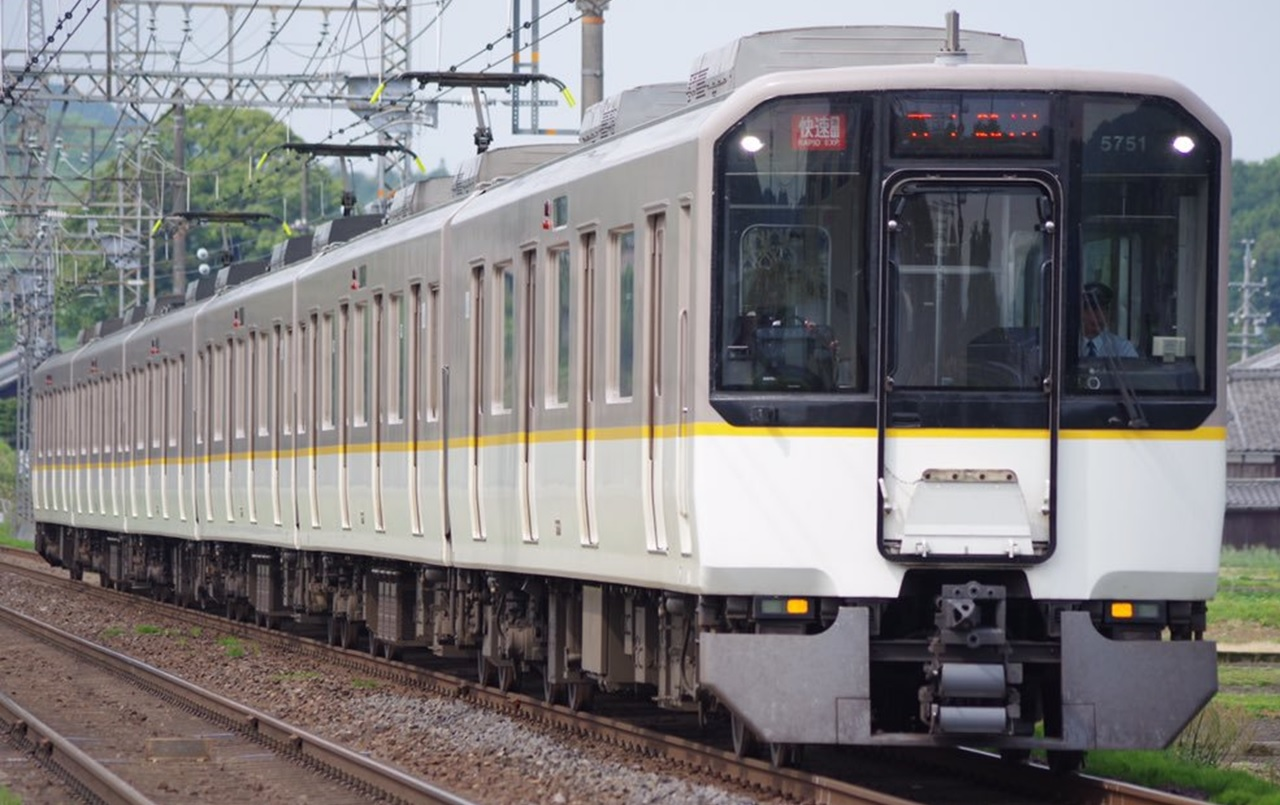 近鉄5820系DH51編成 快速急行五十鈴川行き